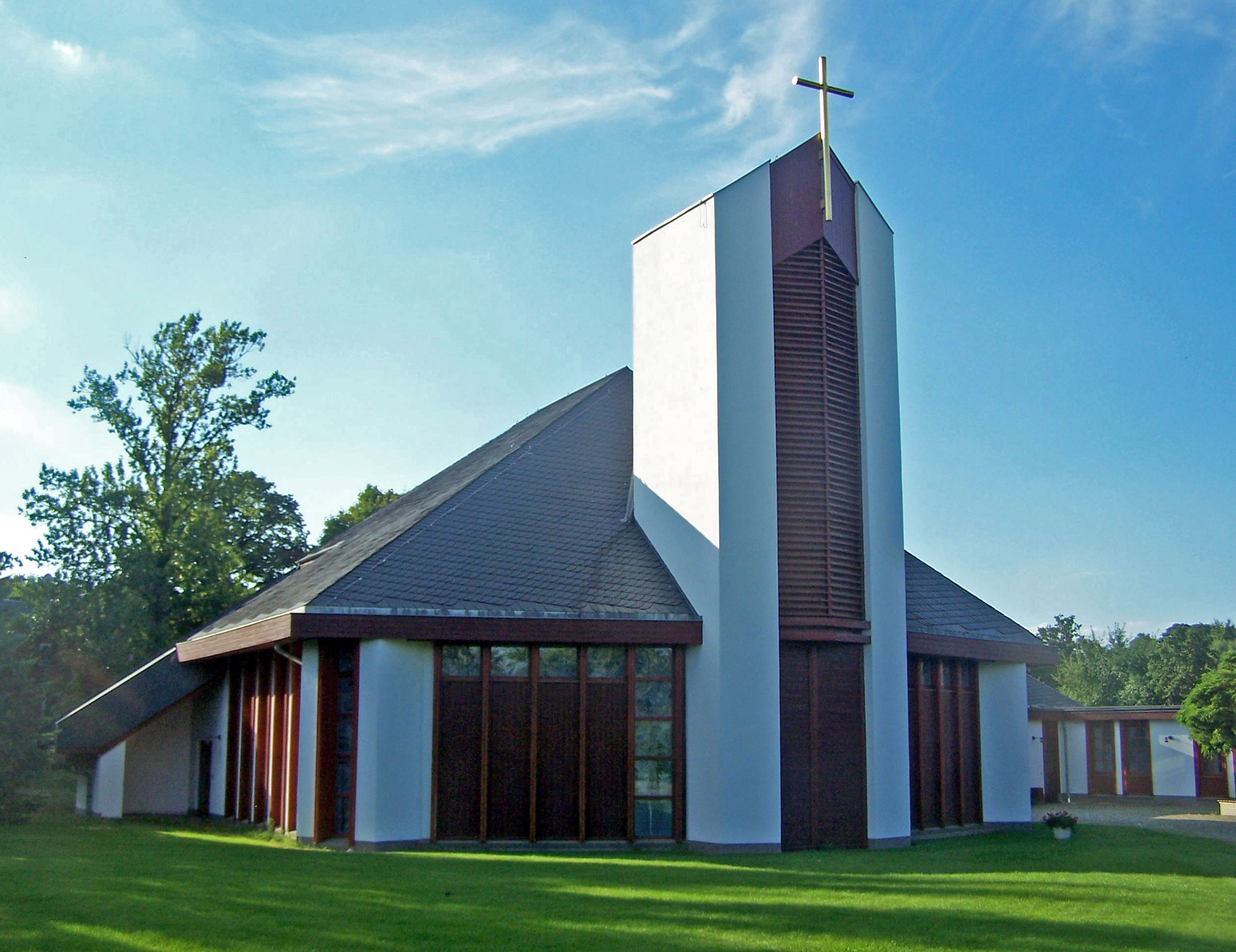 (katholische) Kirche der Heilig-Kreuz-Gemeinde Coswig, Landkreis Meißen, Sachsen